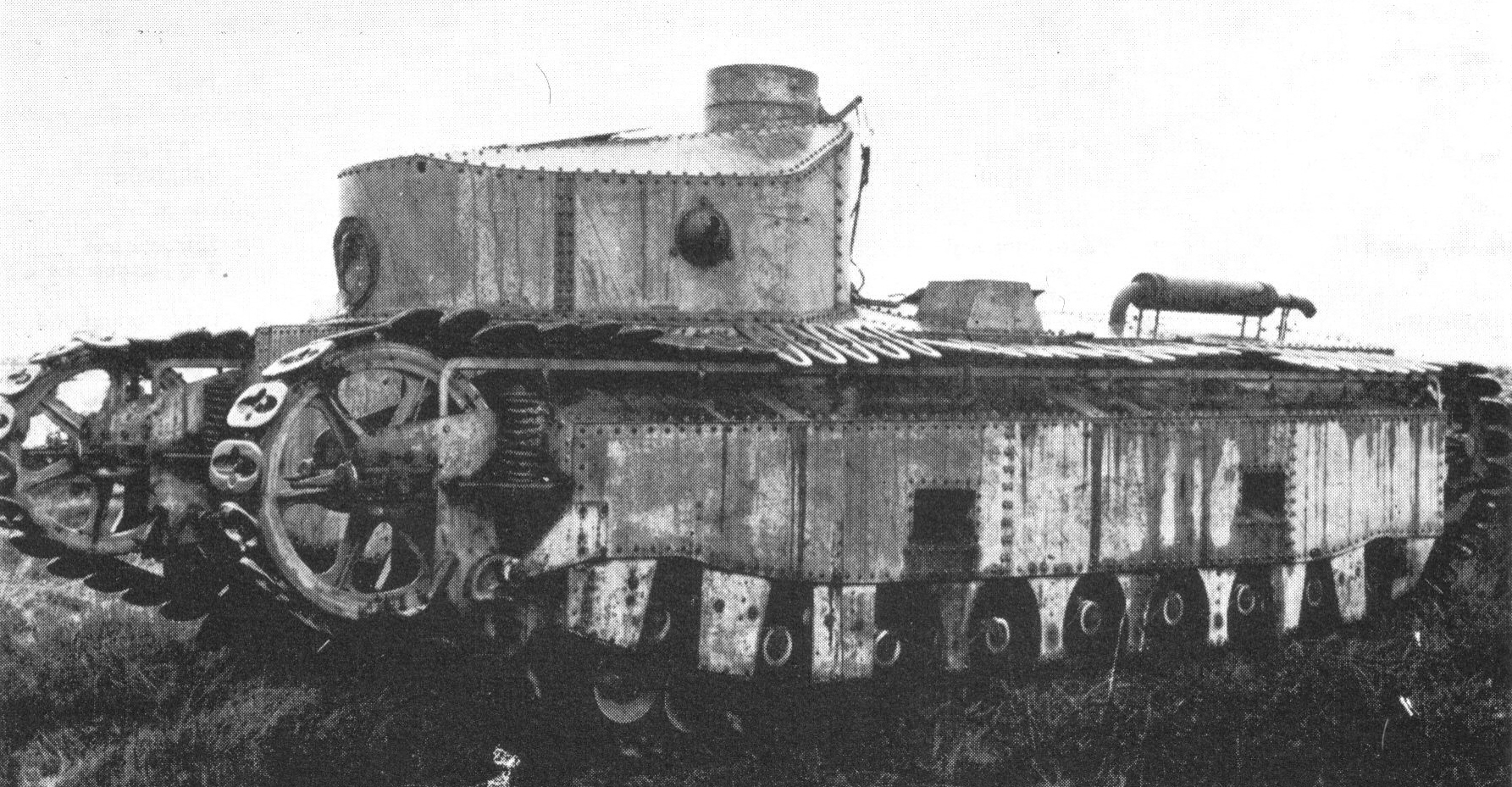 Digitale reproductie foto Light Infantry Tank